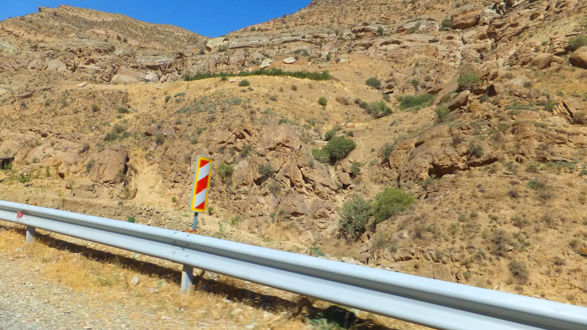 گارد ریل یک خط زشت بر طبیعت کشیده